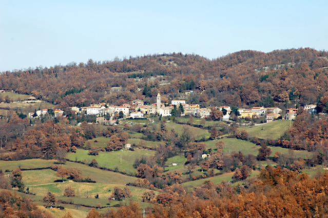 Panorama di Petricci preso da Semproniano.